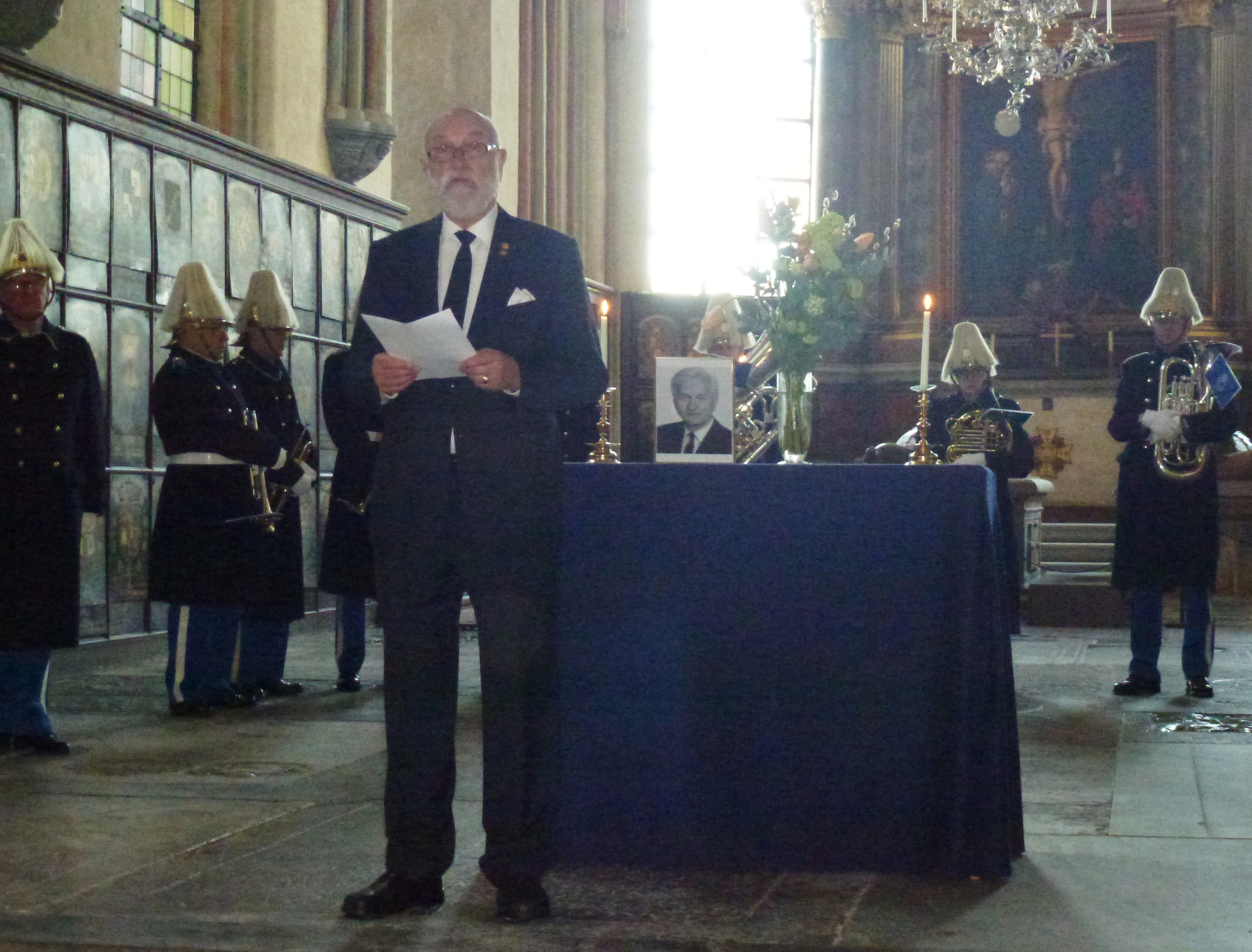 Serafimerringning i Riddarholmskyrkan 11 februari 2015, Staffan Rosén, Vice ordenskansler tillika sekreterare vid Kungl. Maj:ts Orden, professor i Koreas språk och kultur vid Stockholms universitet.